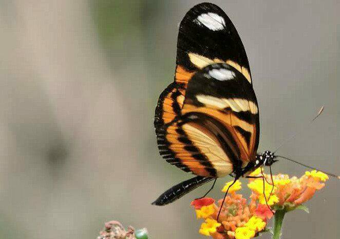 Heliconius ethilla narcaea __ Tremembé SP - Brasil